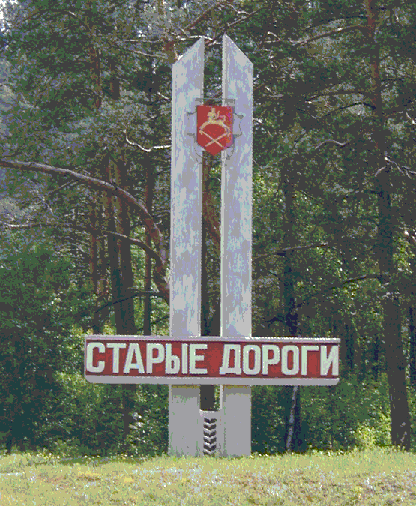 Въездной знак города Старые Дороги